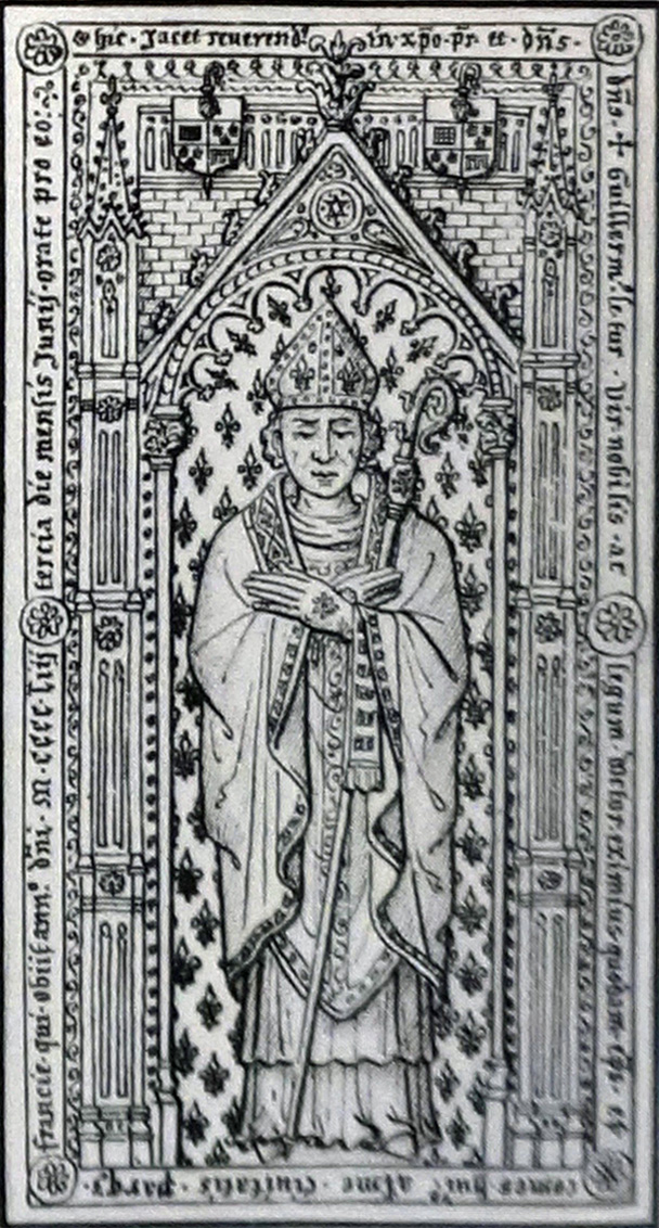 corrigé d'un relevé fait pour Gaignières se trouvant à la BNF.